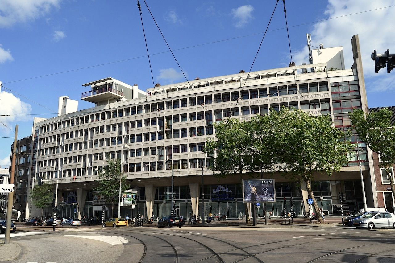 Autopon, Overtoom 527-545, Amsterdam-West. Architect: Ben Ingwersen, bouwjaar 1961. Foto: Erik Swierstra.